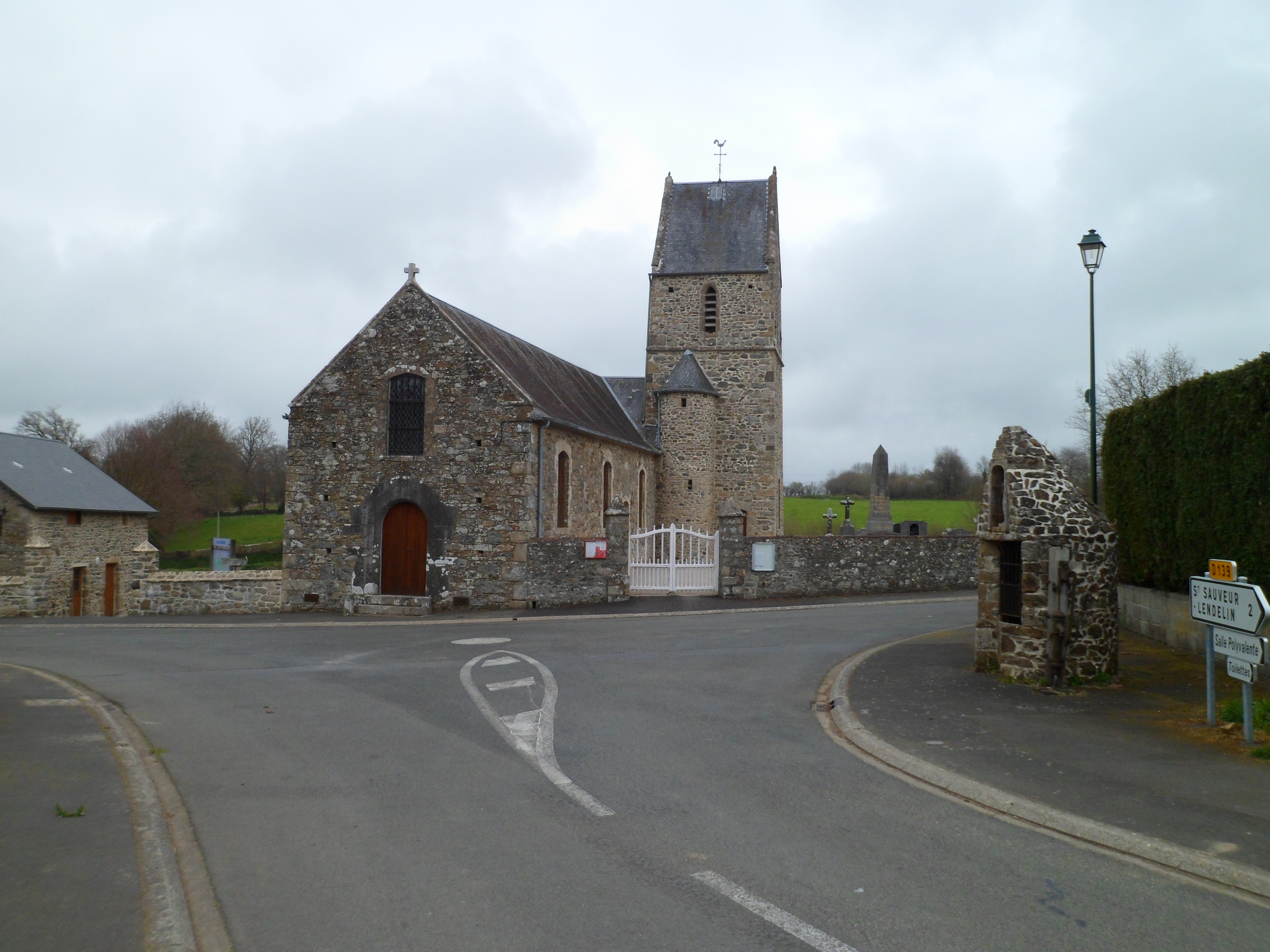 Église Saint-Michel de Saint-Michel-de-la-Pierre